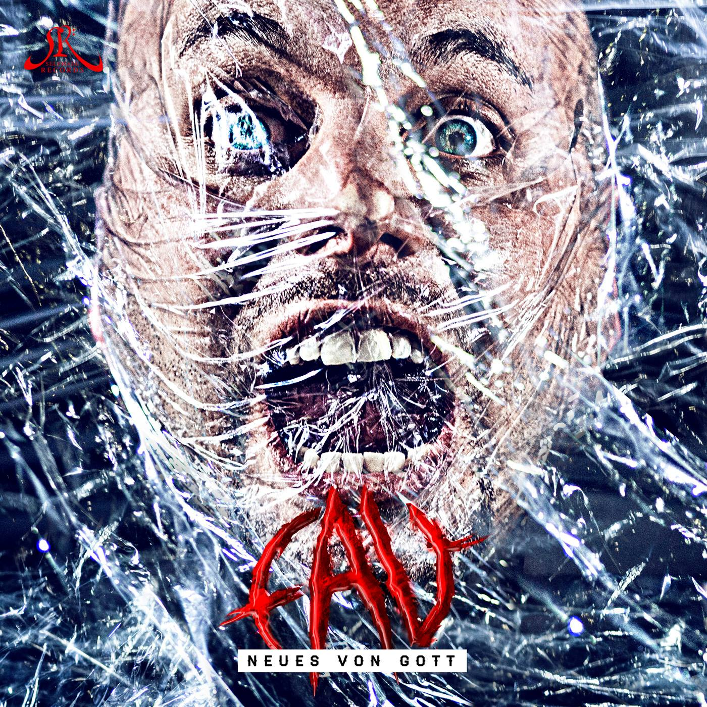 Cover des Albums „Neues von Gott“